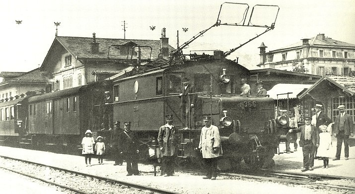 Simplon-Drehstrombetrieb der SBB: elektrische Lokomotive Fb 4/4 Nr. 366 in Sion/Sitten. Der Drehstrombetrieb am Simplon (1906-1930) erreichte zwischen 1919 und 1927 von Brig her auch den Walliser Kantonshauptort Sion (deutsch: Sitten). Danach wurde die Strecke im Rhonetal auf Einphasenwechselstrom der SBB-Norm 15 kV 16 2/3 Hz umgestellt.